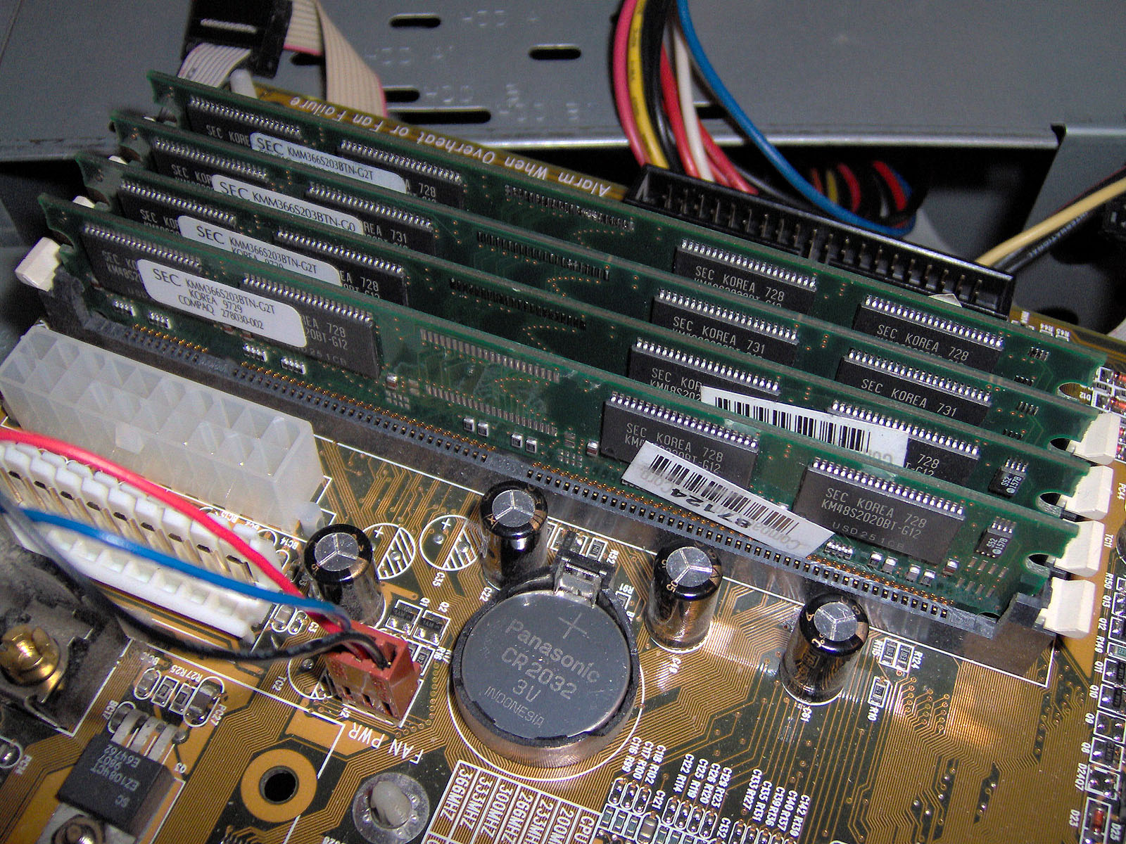 SD-RAM-Speichermodule (PC-66) auf einem Mainboard, davor die Batterie für den CMOS-Speicher (siehe BIOS) Auf dem Bild sind außerdem links die breiten Anschlüße für die Stromversorgung (der obere Anschluss bereits ATX, der untere nur AT-Standard) zu sehen. Das dreiadrige Kabel ist der Anschluss für einen 12 Volt-Lüfter. Es sind außerdem viele einfache elektrische Bauelemente erkennbar, wie z.B. Kondensatoren (die vier zylindrischen Objekte), ein Leistungstransistor (unten links), außerdem winzige ICs mit Widerständen davorgeschaltet.